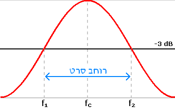 תרגום ושינוי של קובץ מוויקי האנגלית, [1]